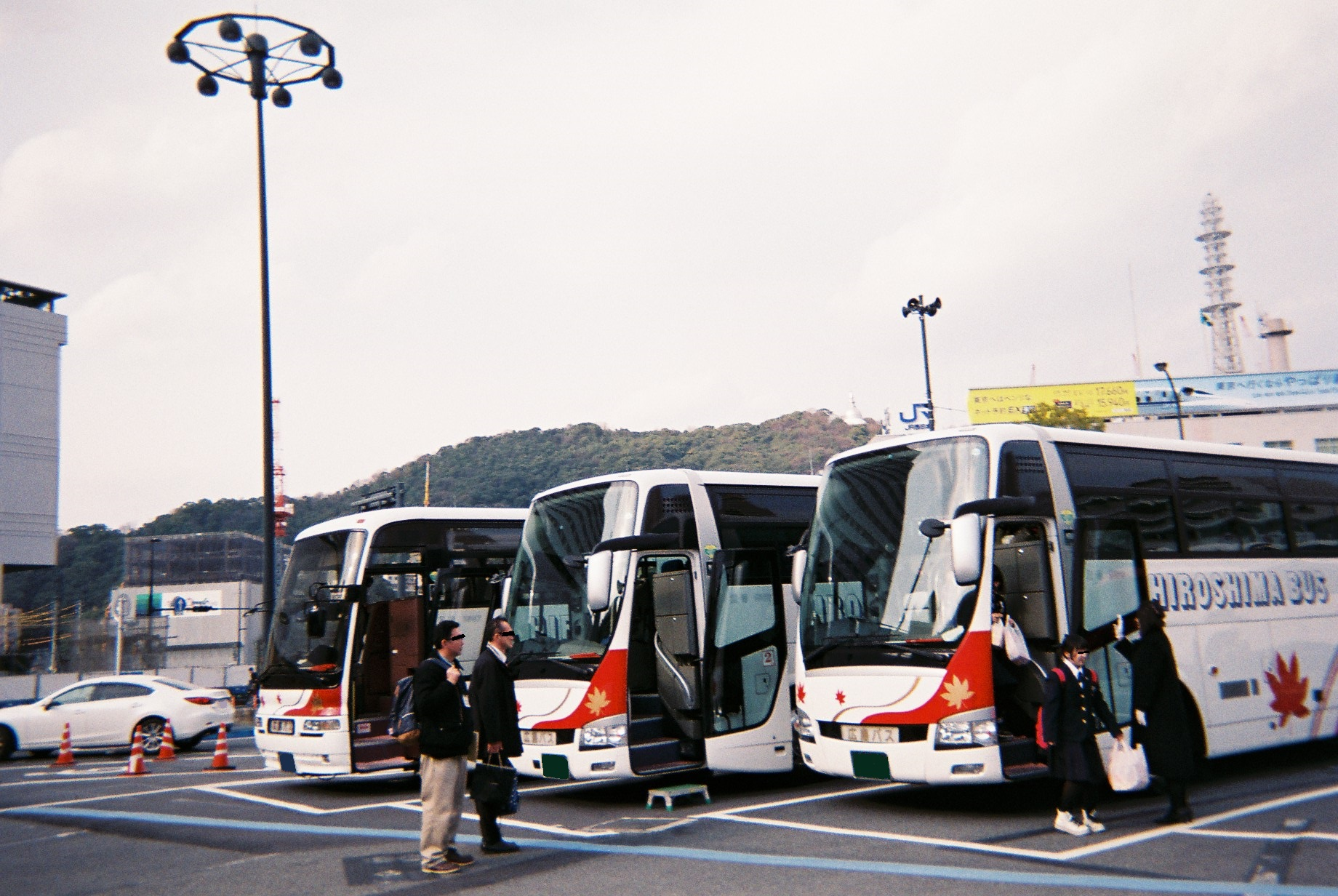 広島駅前の高速バス・観光バス用駐車場にて撮影 広島バス 所属 左 三菱 ふそう エアロクイーン（2代目）・中 右 三菱 ふそう エアロクイーン（3代目） 新潟県内の公立中学校の修学旅行用に貸切運転が行われていたときのもの。